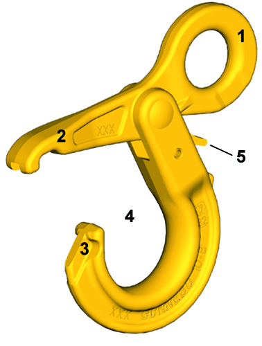 Hak otwarty